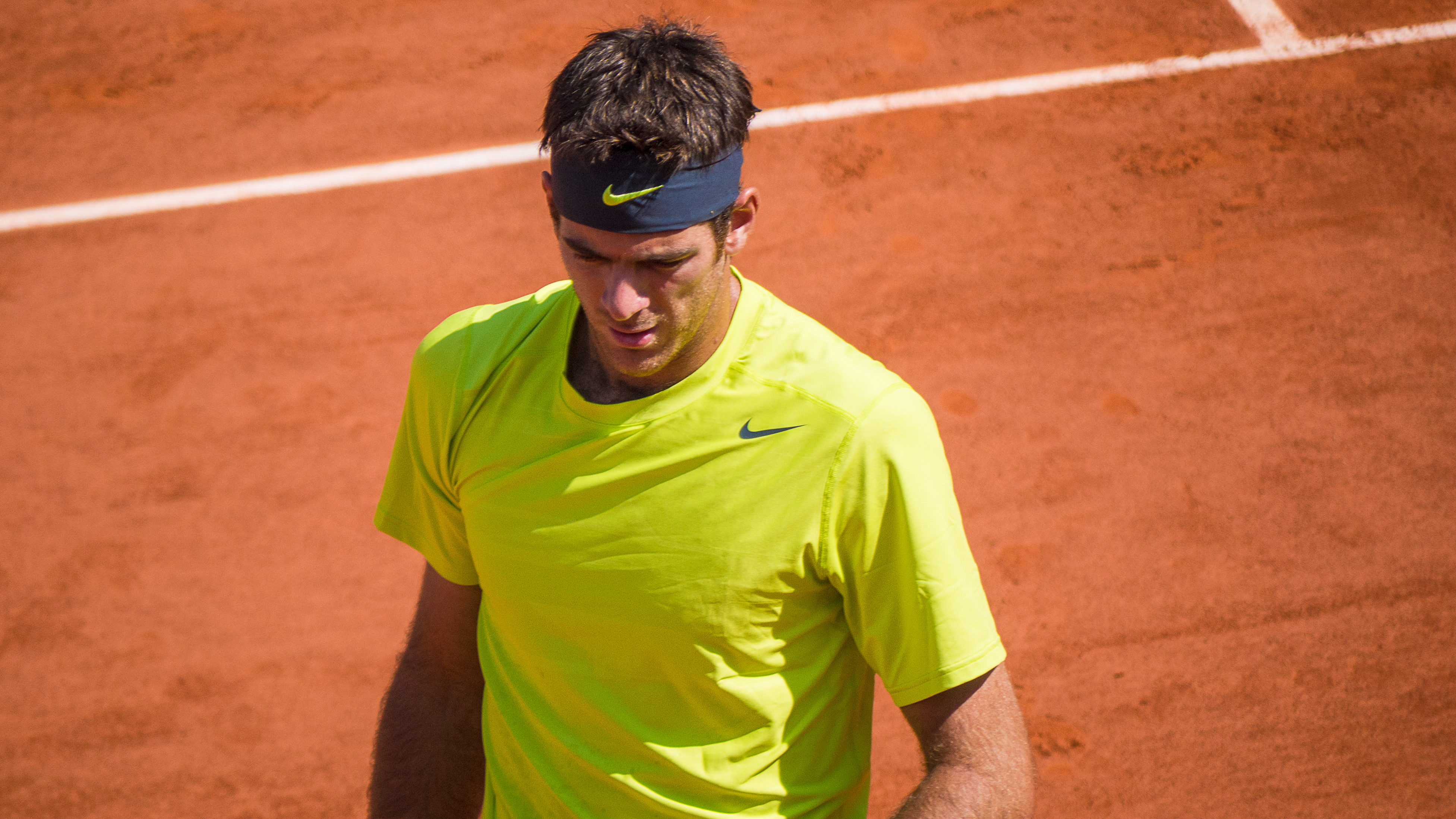 2ème tour Roland Garros 2012 : Juan Martin Del Potro (ARG) def. Edouard Roger-Vasselin (FRA)